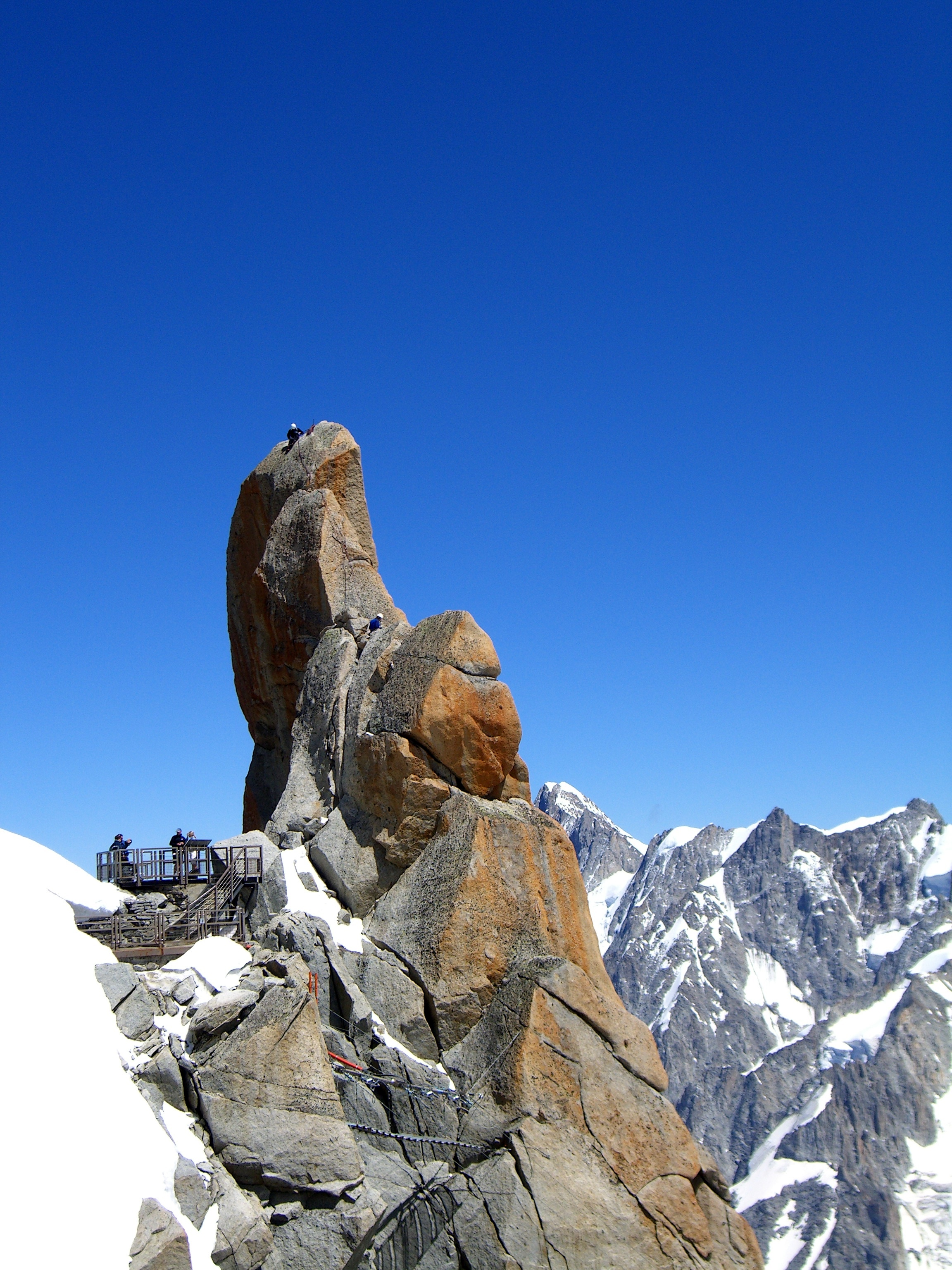 Photo 10-07-2006 14-45-48